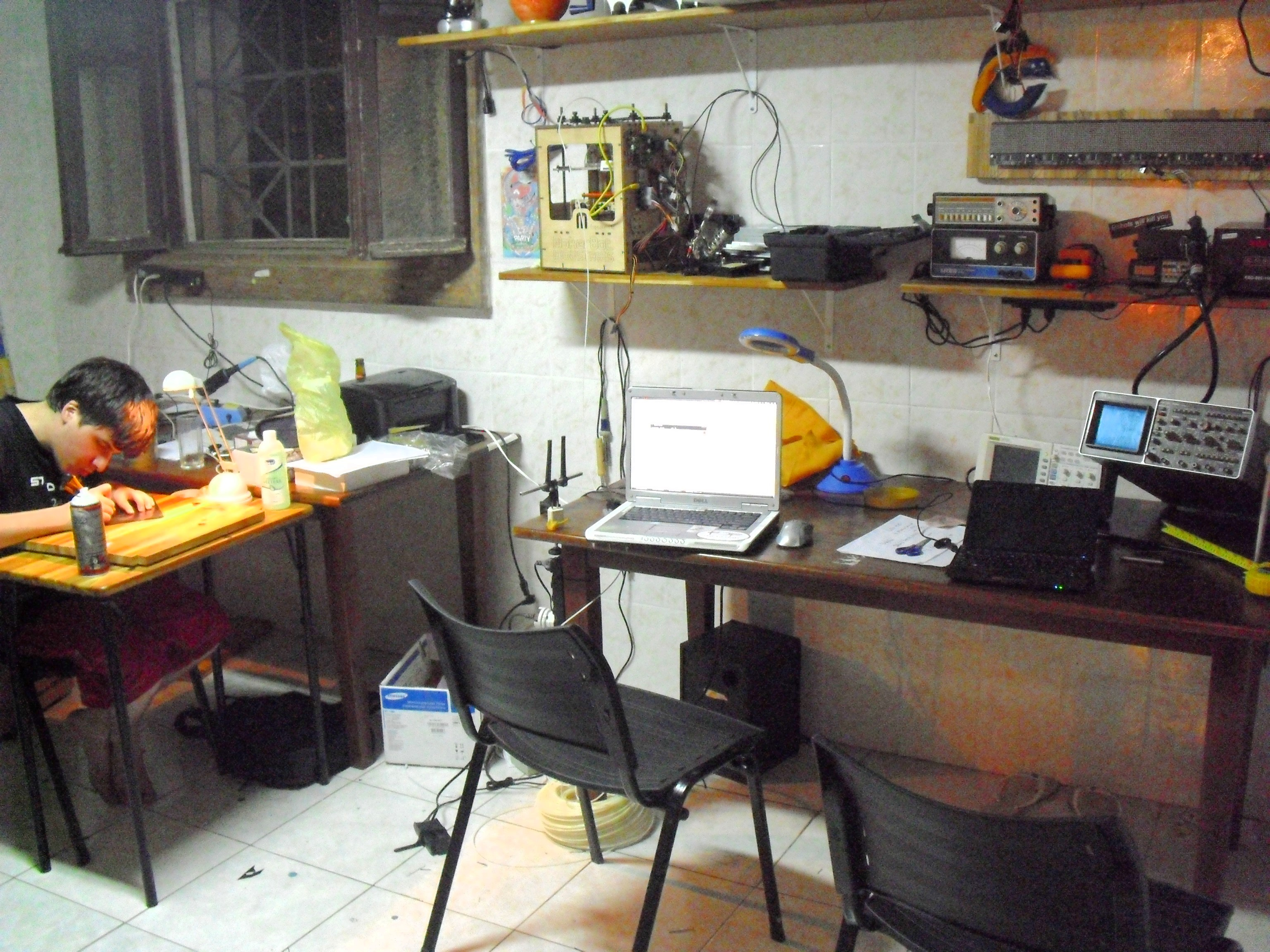 Bancada Eletronica no porão do Garoa Hacker Clube.